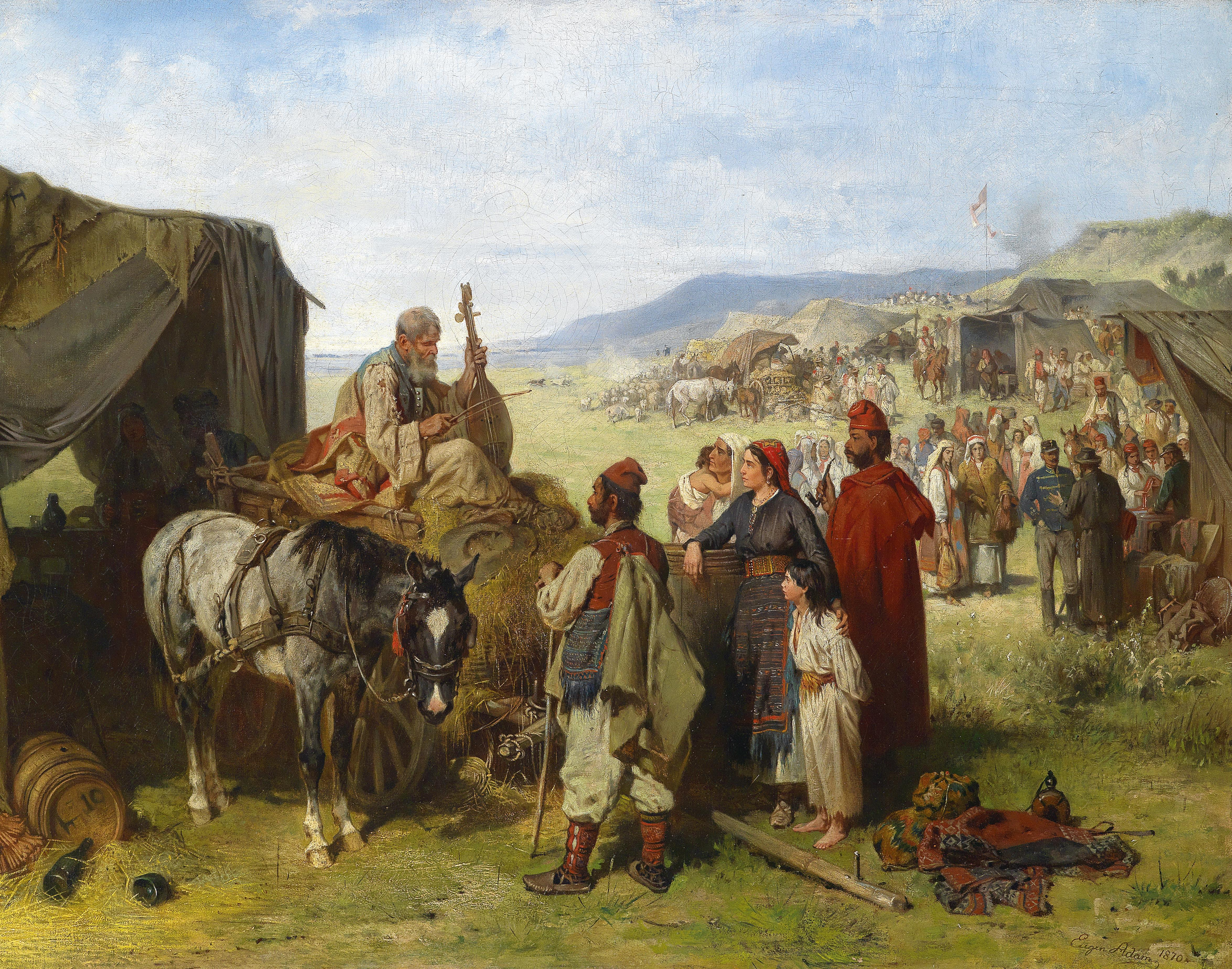 Feldlager in Dalmatien, signiert, datiert Eugen Adam 1870, Öl auf Leinwand, 67 x 91 cm